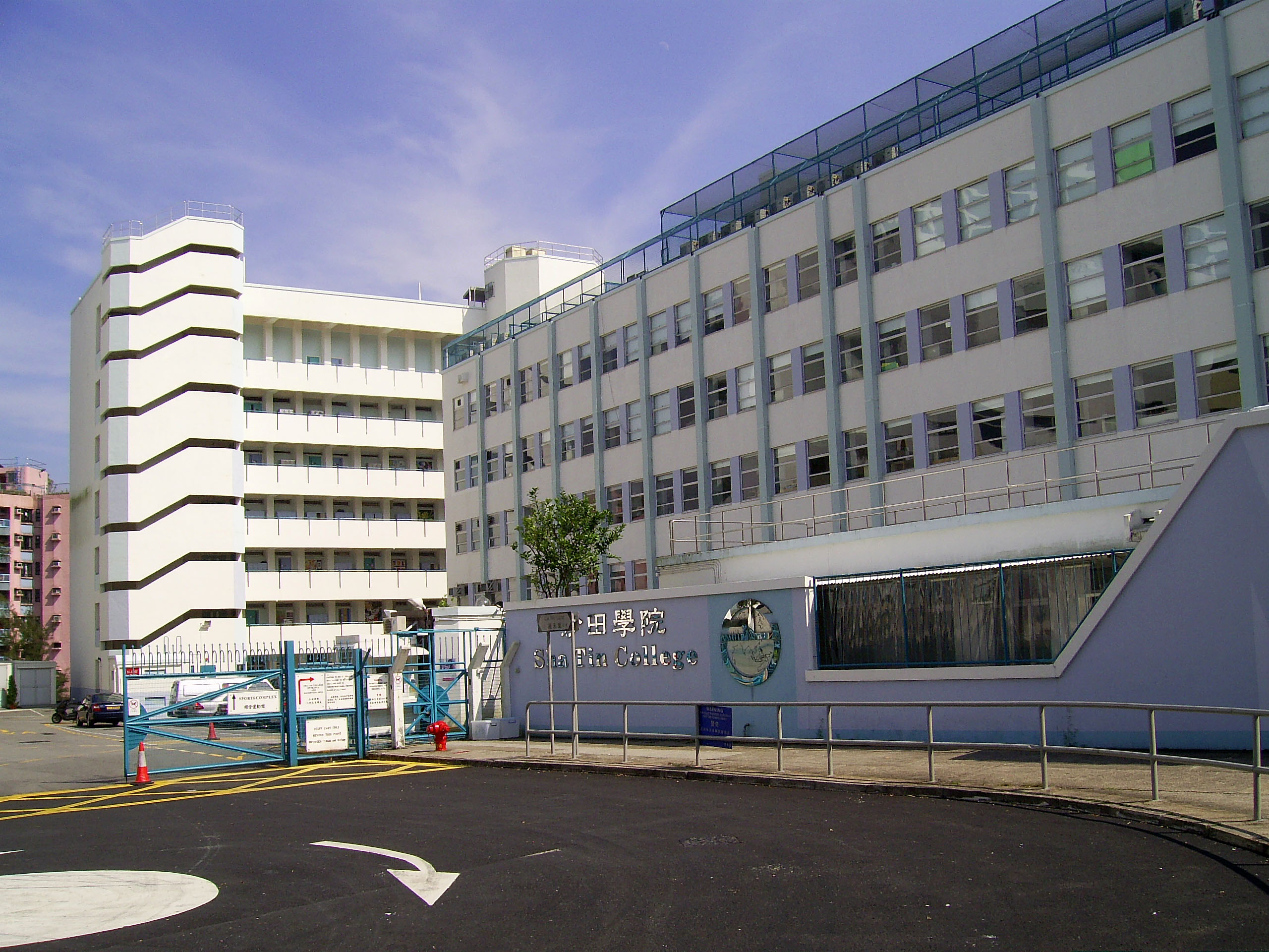 中文（香港）: 英基學校協會沙田學院